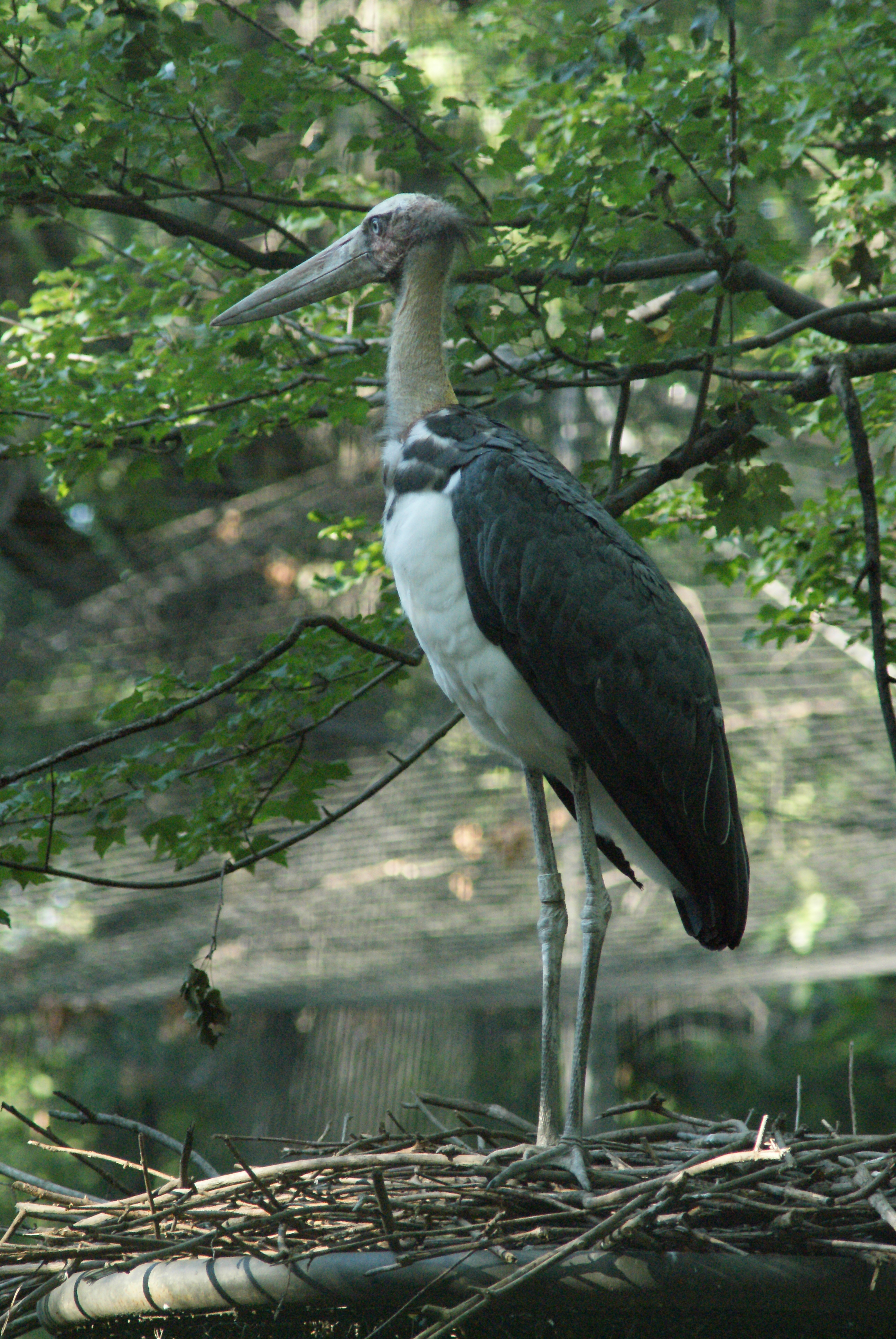 Leptoptilos javanicus Lesser Adjutant Stork